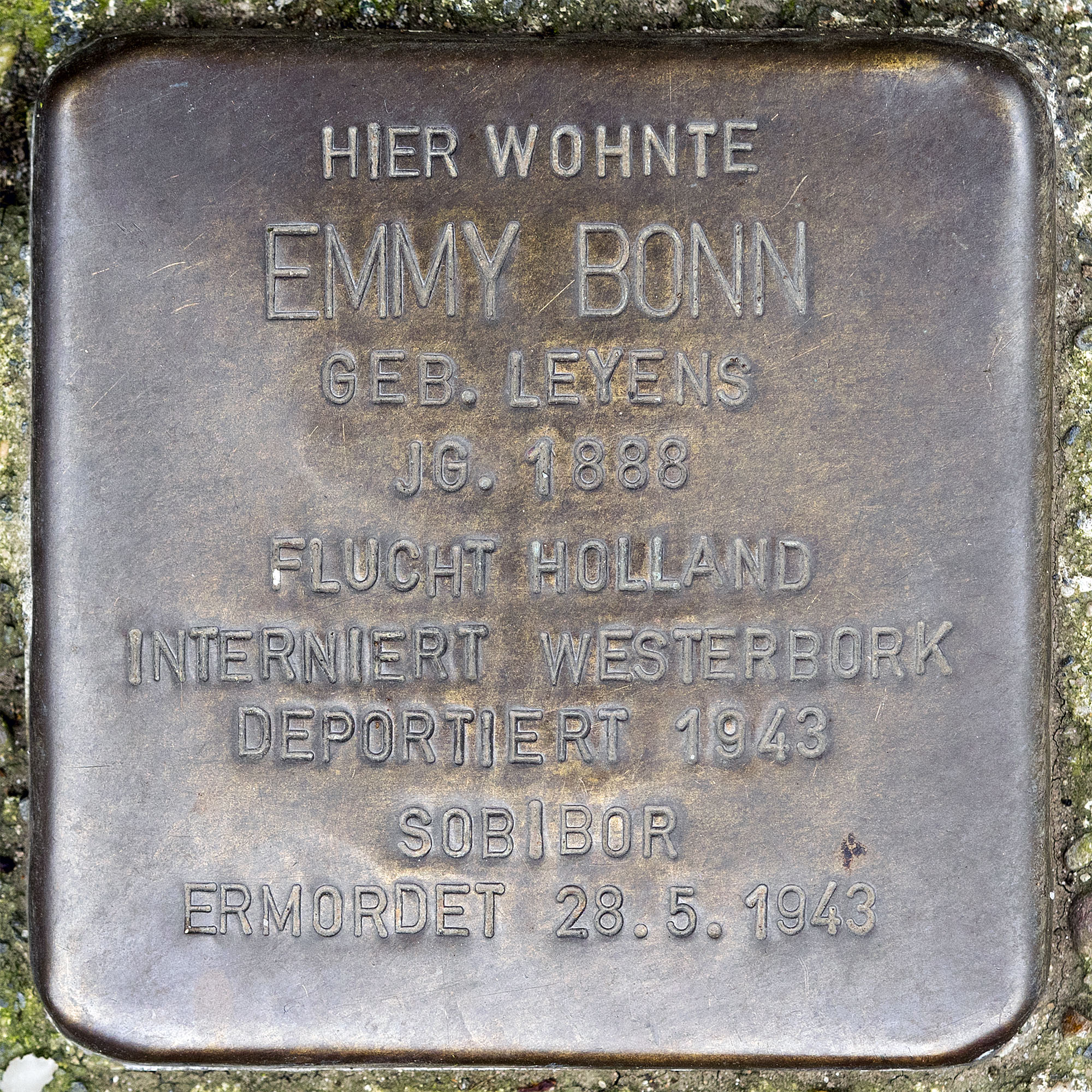 Stolpersteine Nettetal Bonn, Emmy